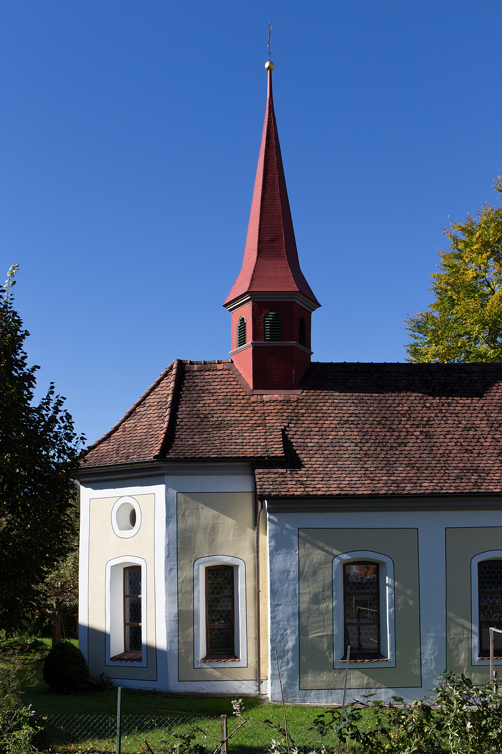 Kapelle St. Josef in Edisried, Sachseln